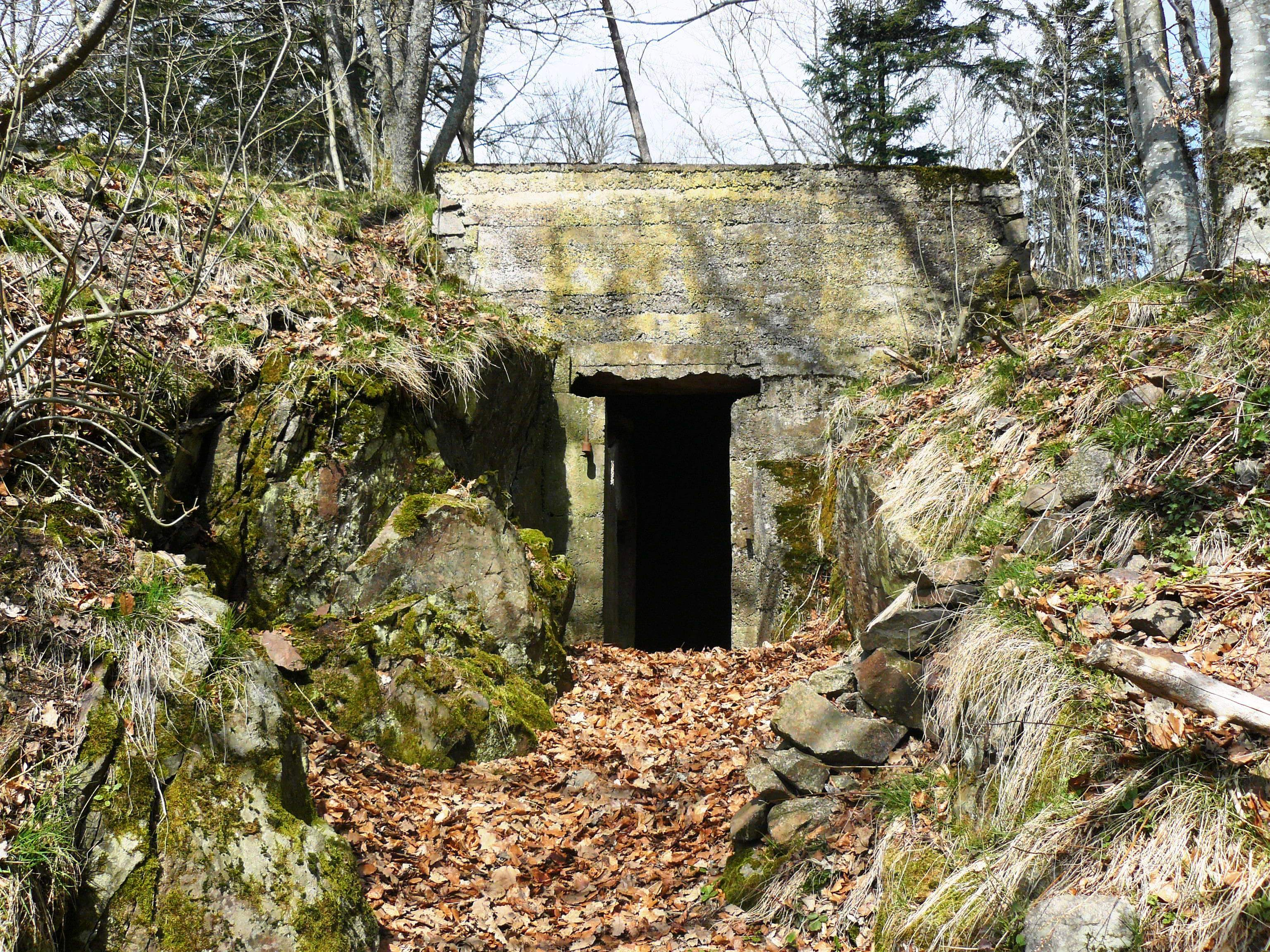 Sainte Marie-aux-Mines A 009.JPG